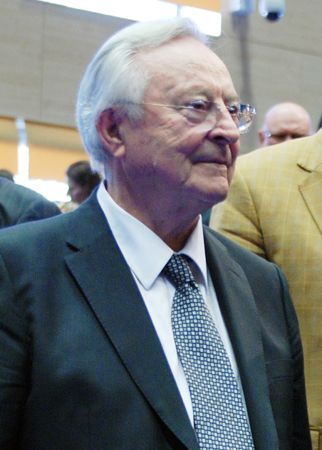 Milan Čič